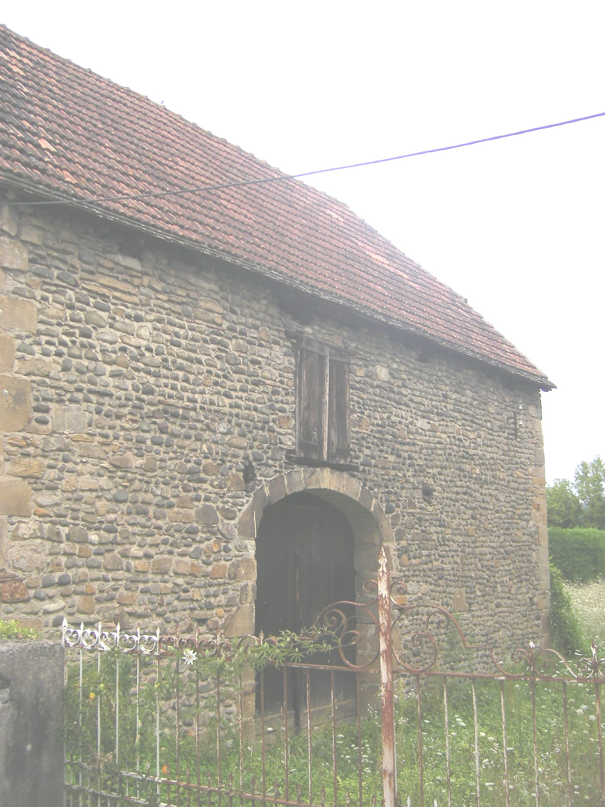 Viellenave-de-Navarrenx